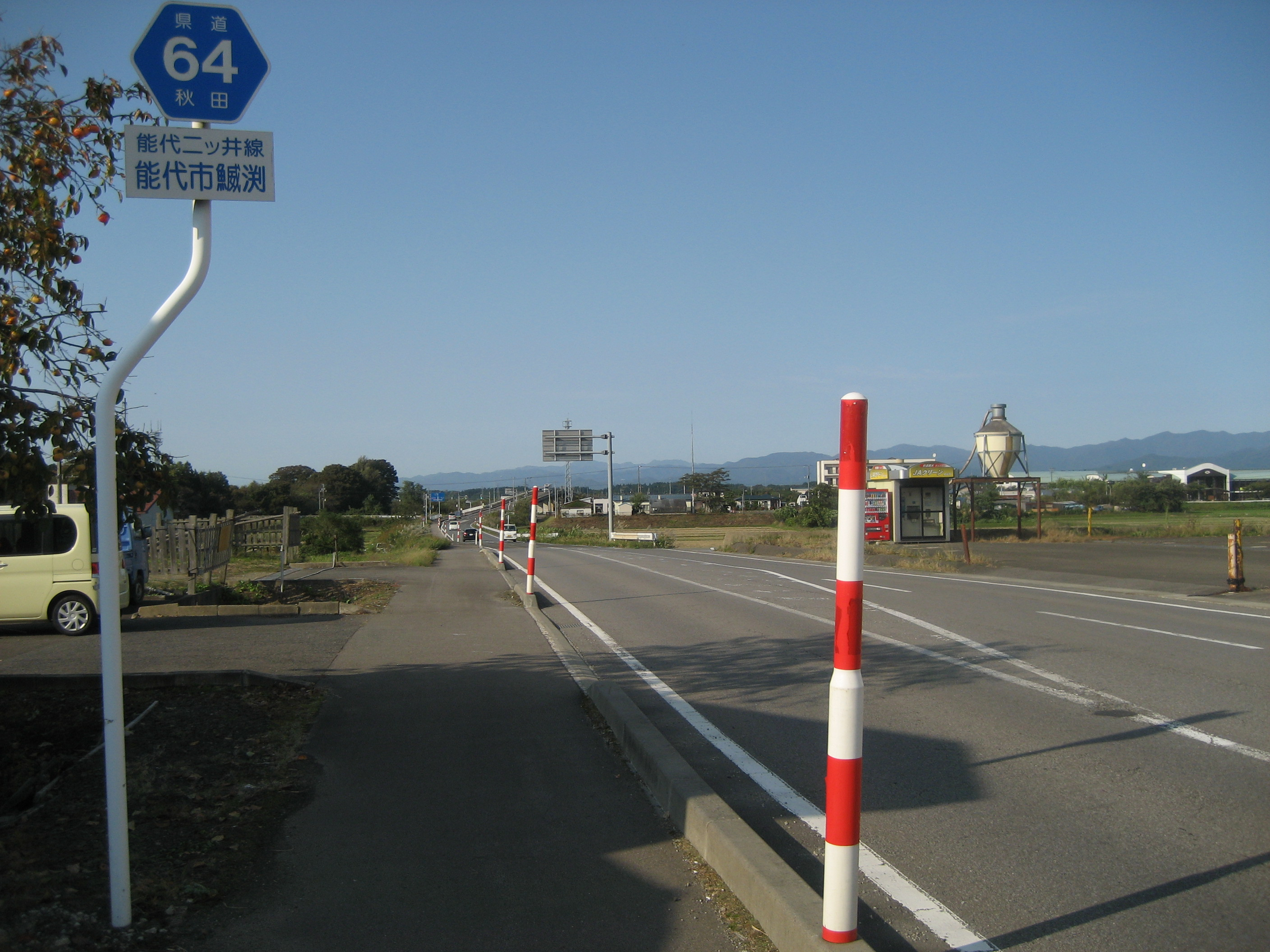 秋田県道60号線能代市鰄渕付近